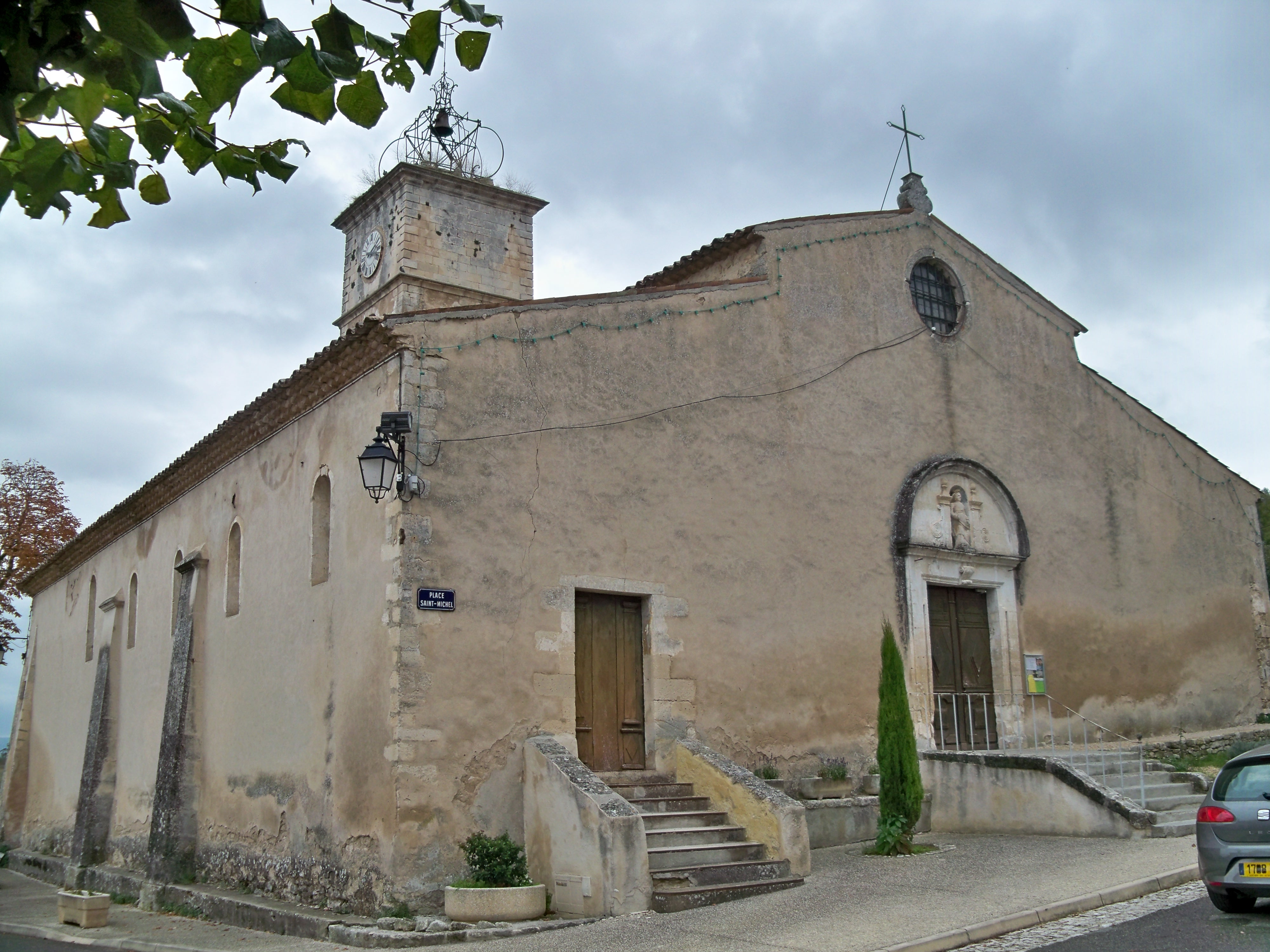 église à Céreste, Alpes de Haute Provence, France